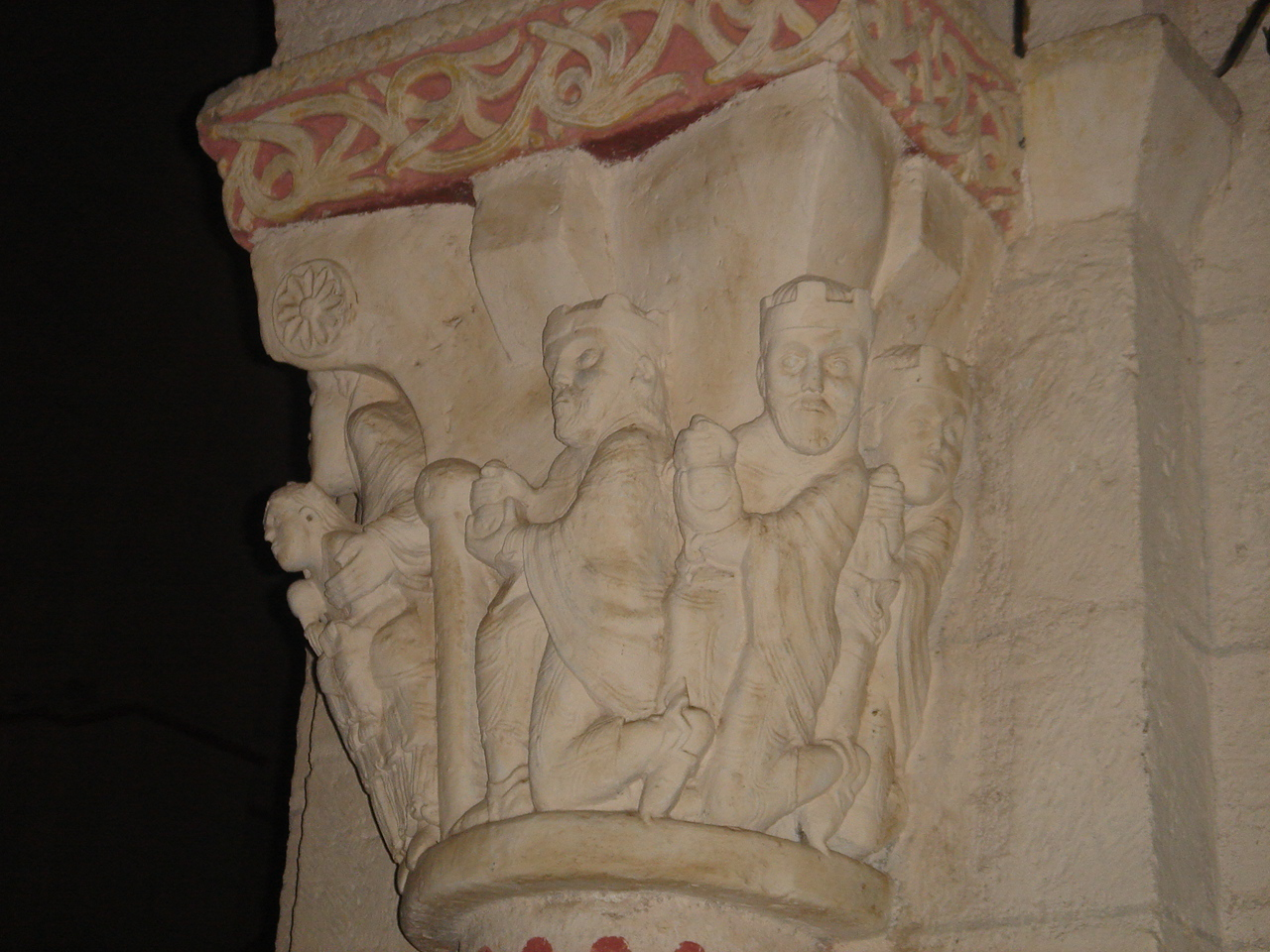 Capitel historiado de la iglesia de Sainte-Engrâce, en la comarca de Sola (Pirineos Atlánticos, Francia). Representa la adoración de los Reyes Magos. El capitel corona una de las seis columnas de la nave de la iglesia.